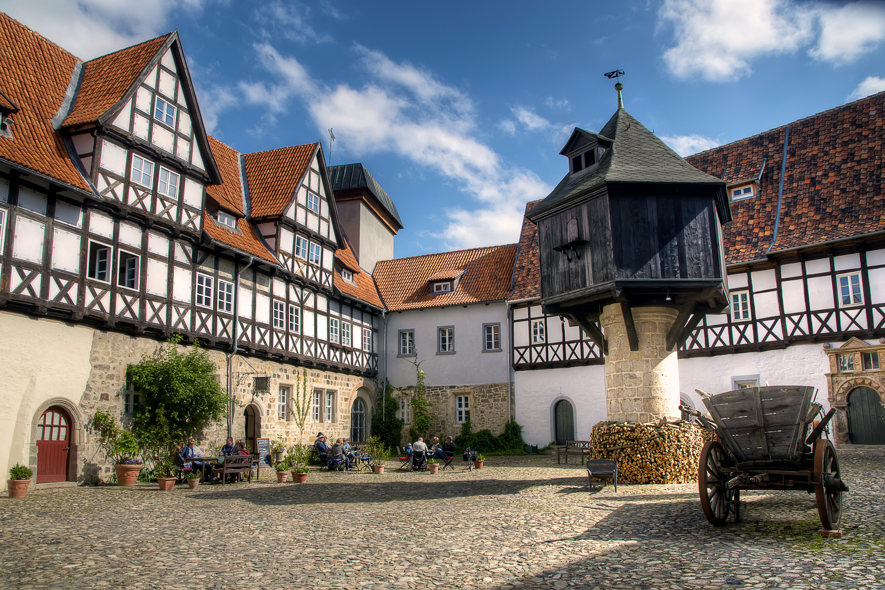 Der Fleischhof ist eine denkmalgeschützte Hofanlage in der Stadt Quedlinburg in Sachsen-Anhalt. Er befindet sich im südlichen Teil der historischen Quedlinburger Altstadt Adresse: Wordgasse 4, 06484 Quedlinburg Koordinaten: 51,787753 N, 11,140004 O